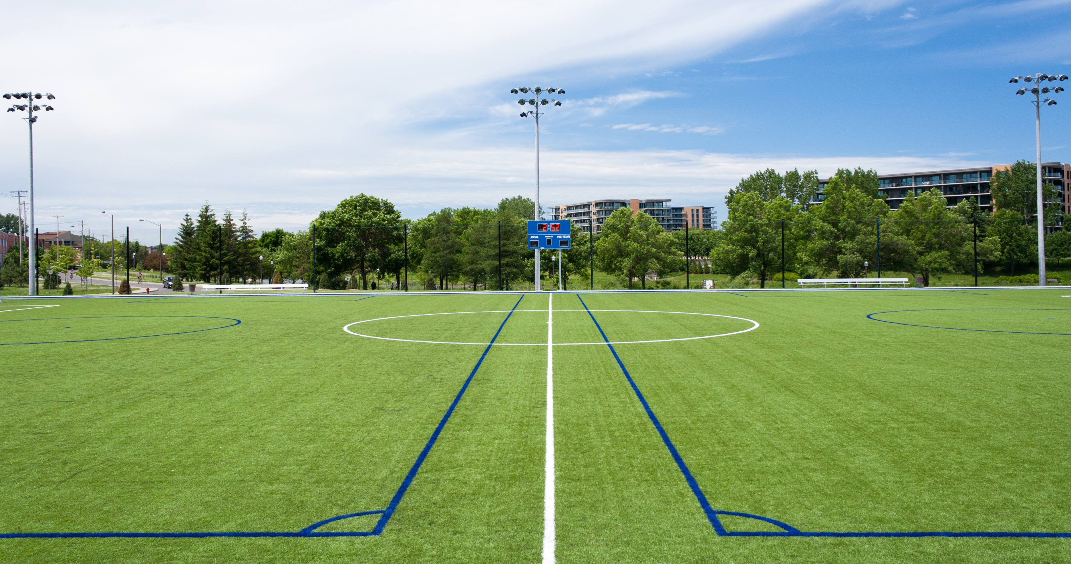 Image de la ville de Québec provenant du concours Wikipédia prend Québec.